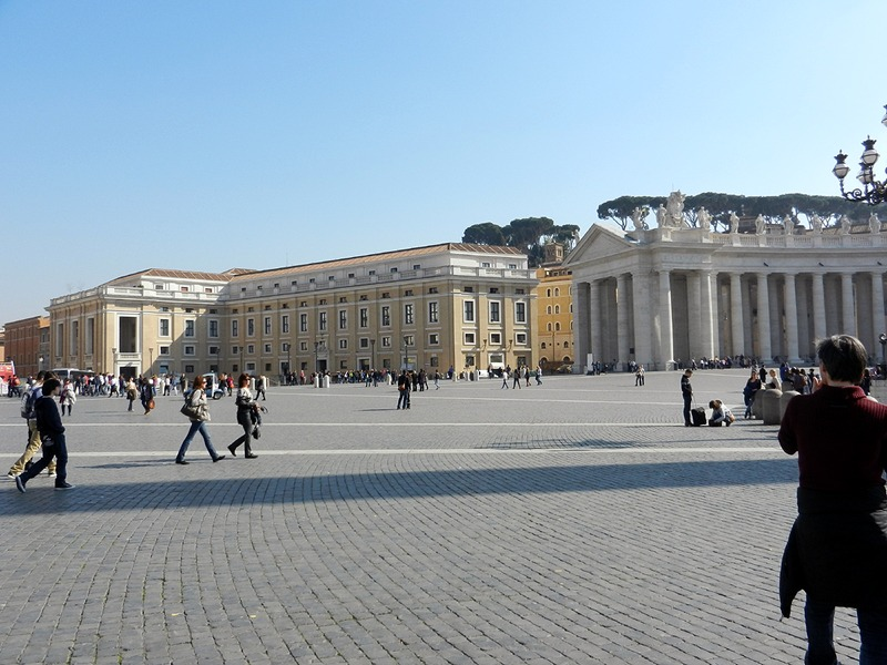 Città del Vaticano - Piazza S. Pietro